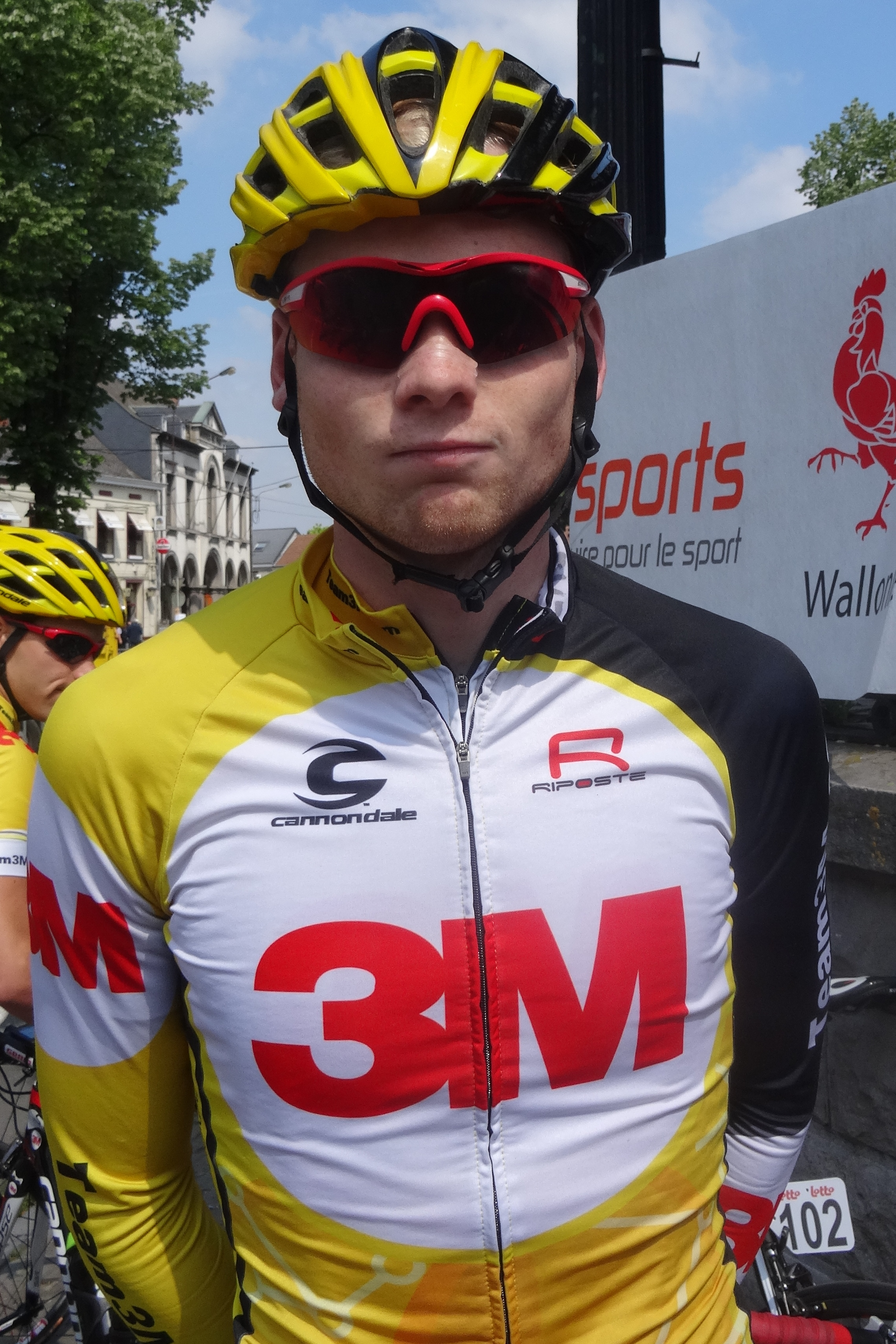 Reportage réalisé le samedi 17 mai à l'occasion du départ du Grand Prix Criquielion 2014 à Boussu, Belgique.